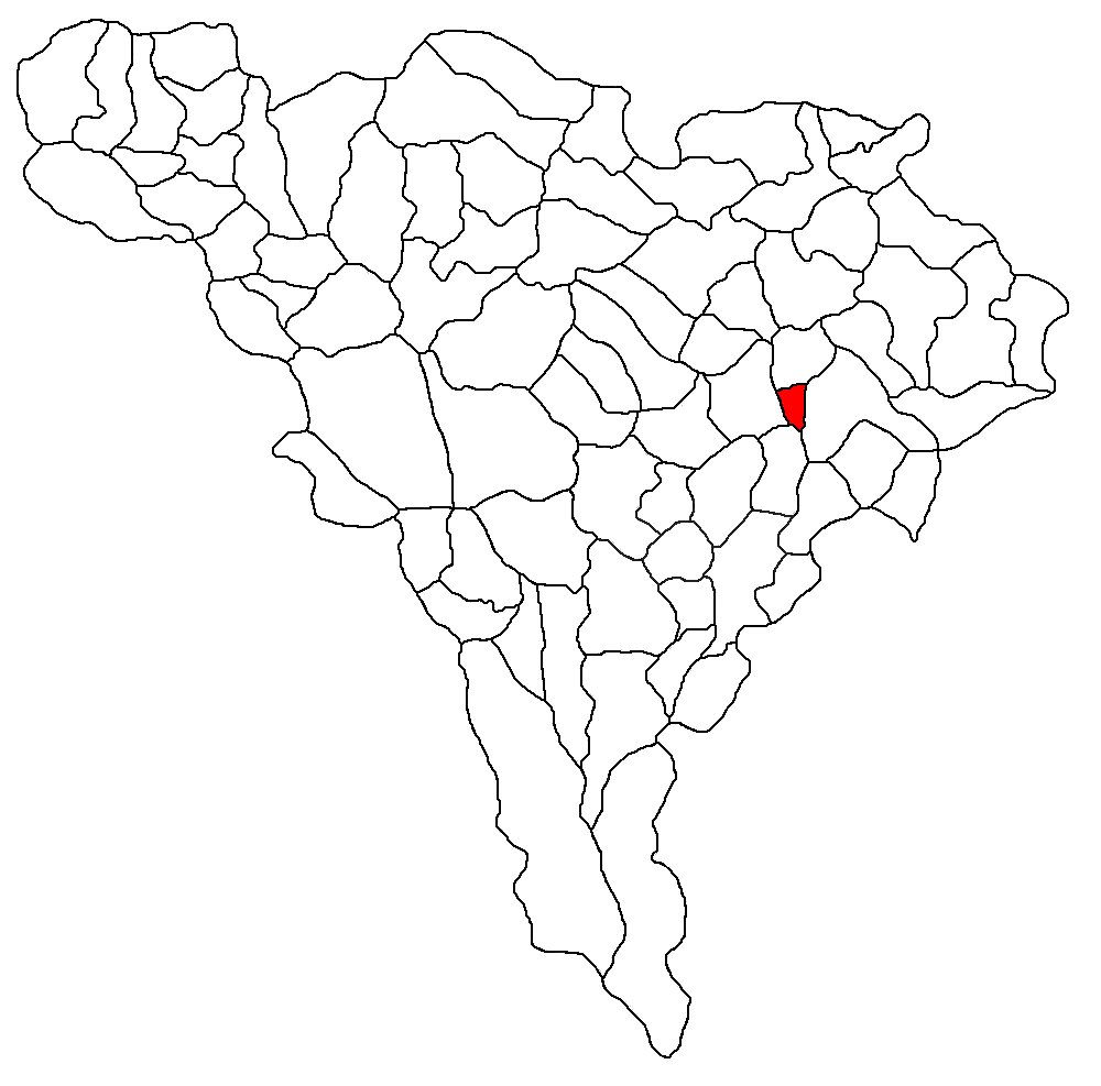 Categorie:Hărţi ale judeţului Alba